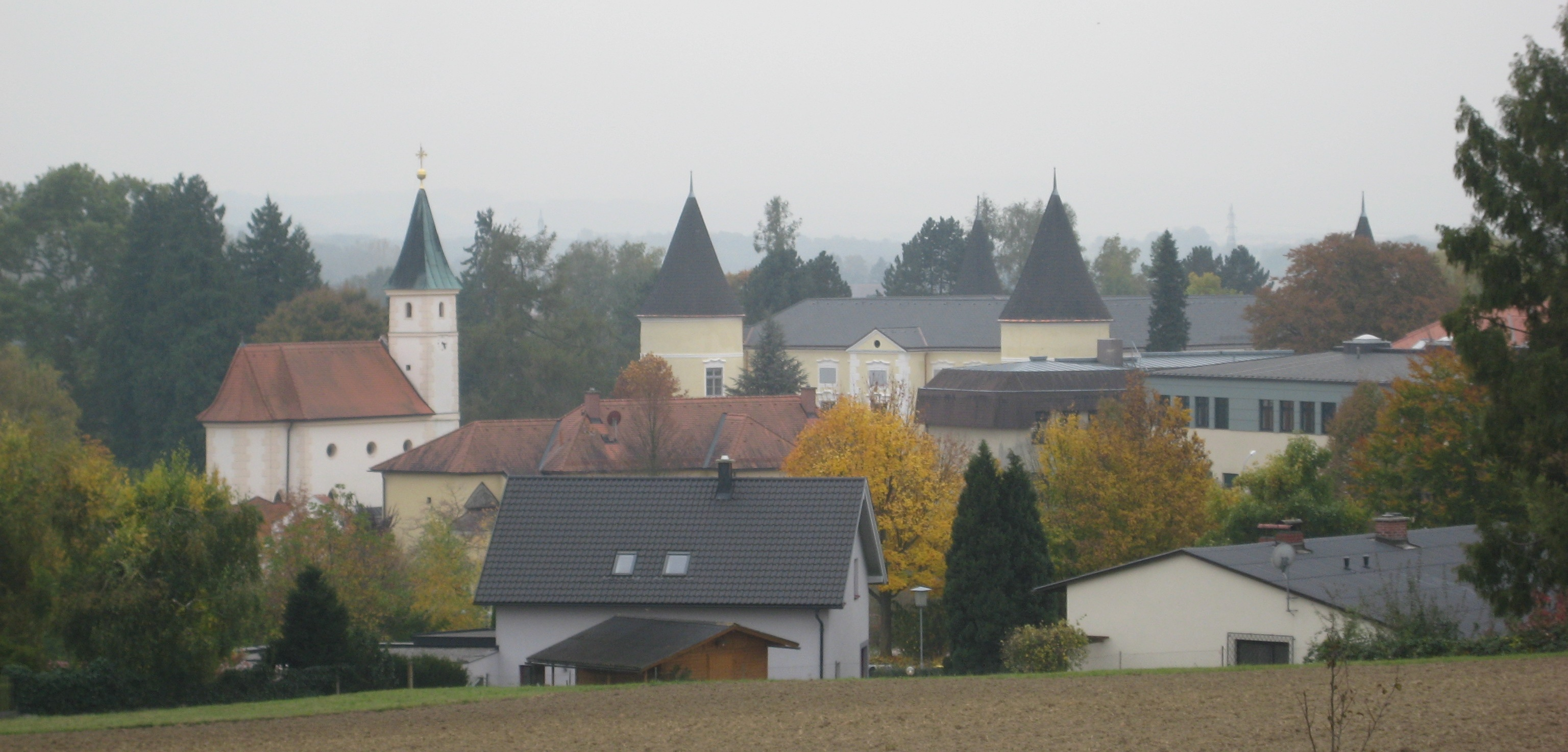 sicht aufs fransisco josephinum in weinzierl, wieselburg, österreich